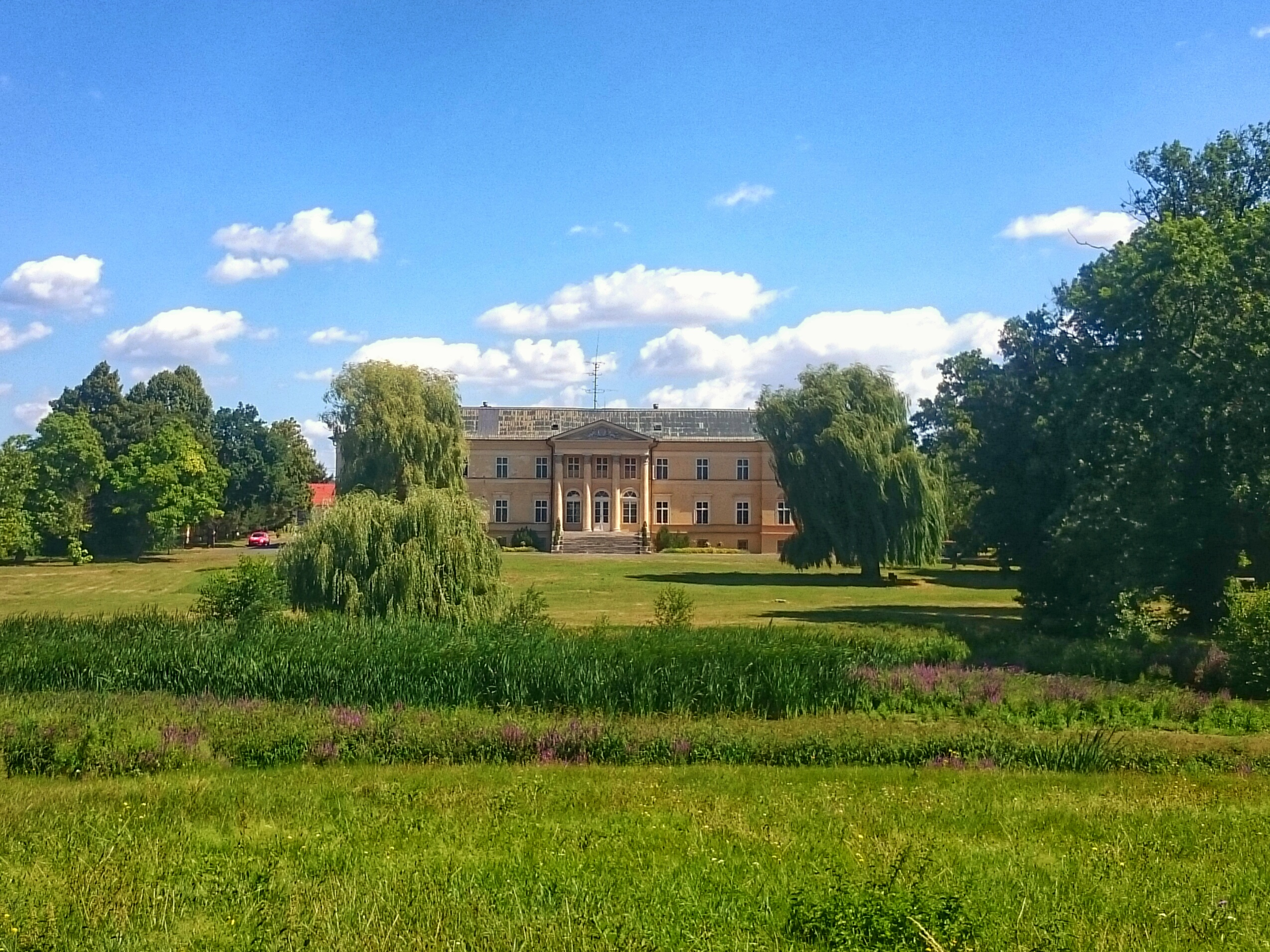 Pohľad na kaštiel z parku.